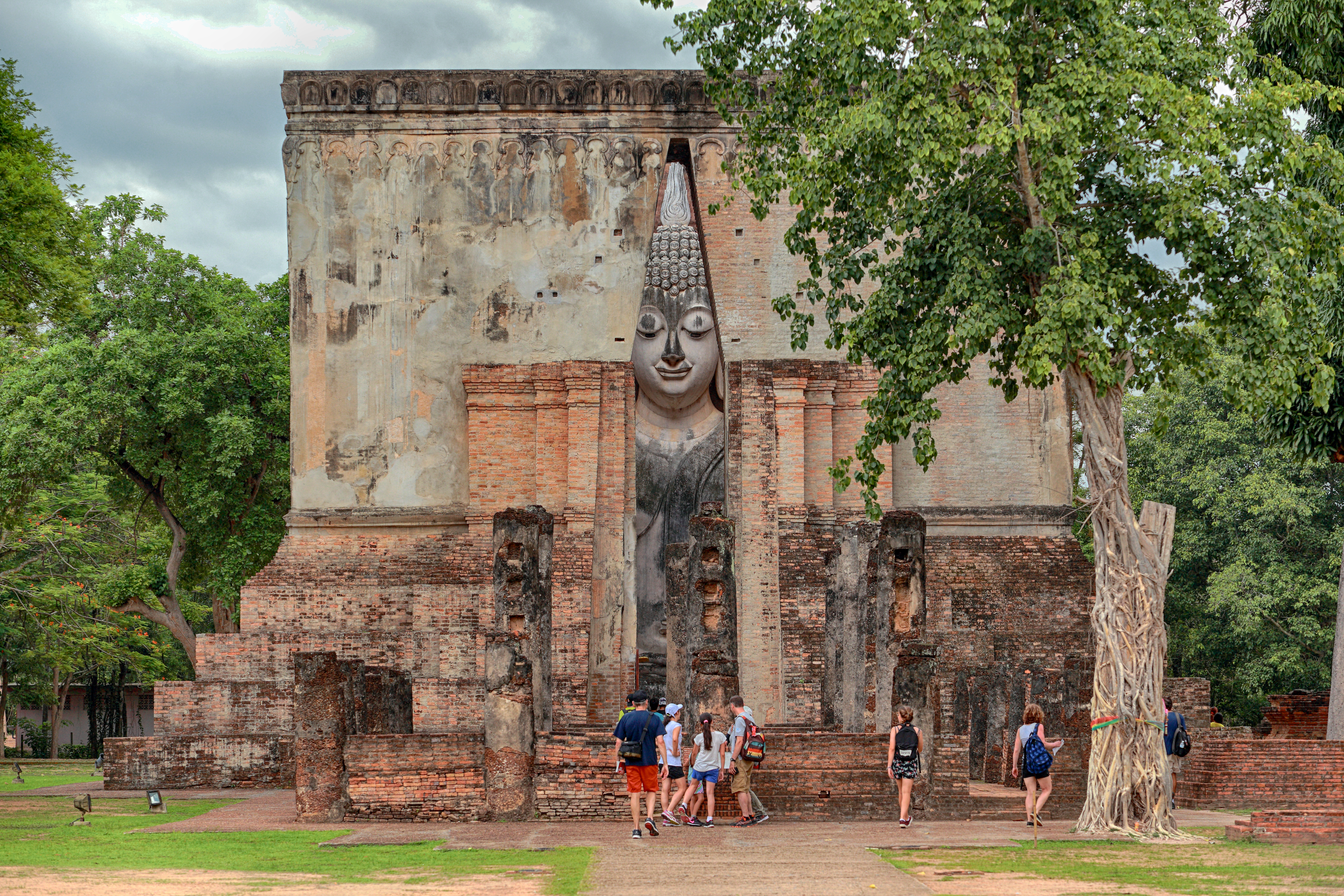 "วัดศรีชุม" มาจากคำเรียกพื้นเมืองเดิม ซึ่งหมายถึง ต้นโพธิ์ ดังนั้นชื่อ ศรีชุม จึงหมายถึงดงของต้นโพธิ์ แต่ในหนังสือพระราชพงศาวดารกรุงศรีอยุธยาที่เขียนในสมัยอยุธยาตอนปลาย ไม่เข้าใจความหมายนี้แล้ว จึงเรียกสถานที่นั้นว่า "ฤๅษีชุม" วัดศรีชุมนั้น สันนิษฐานว่าสร้างในสมัยพ่อขุนรามคำแหง โดยปรากฏอยู่ในศิลาจารึกสุโขทัยหลักที่ 1 ว่า "เบื้องตีนนอนเมืองสุโขทัยนี้...............มีพระอจนะ มีปราสาท" พระประธานในมณฑปจึงมีชื่อว่า "พระอจนะ" พระมณฑปกว้างด้านละ 32 เมตร สูง 15 เมตร ผนังหนา 3 เมตร ผนังด้านซ้ายเจาะเป็นทางทำบันได ในผนังขึ้นไปถึงหลังคา ตามฝาผนังอุโมงค์มีภาพเขียนเก่าแก่แต่เลอะเลือนเกือบหมด ภาพเขียนนี้มีอายุเกือบ 700 ปี เพดานผนังมีแผ่นหินชนวนสลักภาพลายเส้นเป็นเรื่องในชาดกต่างๆ มีจำนวน 50 ภาพ เรียงประดับต่อเนื่องกัน ทั้งหมดนี้ถือได้ว่าเป็นงานจิตรกรรมไทยที่เก่าแก่ที่สุด ในสมัยอยุธยา เมื่อครั้งสมเด็จสมเด็จพระนเรศวรมหาราช ประกาศอิสรภาพในปี พ.ศ. 2127 ที่เมืองแครง ทำให้หัวเมืองต่าง ๆ ยกเลิกการส่งส่วยให้กับพม่า แต่ยังมีเมืองเชลียง ( สวรรคโลก) ที่ไม่ยอมทำตามพระราชโองการของพระองค์ พระองค์จึงนำทัพเสด็จมาปราบเมืองเชลียง และได้มีการมาชุมนุมทัพที่วัดศรีชุมแห่งนี้ก่อนที่จะไปตีเมืองเชลียง และด้วยการรบในครั้งนั้นเป็นการรบระหว่างคนไทยกับคนไทยด้วยกัน ทำให้เหล่าทหารไม่มีกำลังใจในการรบไม่อยากรบ สมเด็จพระนเรศวรจึงได้วางแผนสร้างกำลังใจให้กับทหาร โดยการให้ทหารคนหนึ่งปีนบันไดขึ้นไปทางด้านหลังองค์พระ และพูดให้กำลังใจแก่เหล่าทหาร ทำให้ทหารเกิดกำลังใจที่จะต่อสู้ ด้วยเหตุนี้จึงทำให้เกิดตำนานพระพูดได้ที่วัดศรีชุมแห่งนี้ และพระนเรศวรยังได้มีการทำพิธีถือน้ำพิพัฒน์สัตยาขึ้นที่วัดแห่งนี้ด้วย ตามหลักฐานระบุว่าวัดแห่งนี้ได้มีการบูรณะครั้งใหญ่ในสมัยพระเจ้าลิไท และมีการดูแลบูรณะเรื่อยมา สันนิษฐานว่าวัดนี้ได้ถูกทิ้งร้างในสมัยอยุธยาตอนปลาย จนกระทั่งในสมัย รัชกาลที่ 9 ได้มีโครงการบูรณปฏิสังขรณ์ ในปี พ.ศ. 2495 โดยเริ่มมีการบูรณะพระพุทธรูปพระอจนะ โดยศาสตราจารย์ศิลป์ พีระศรี และอาจารย์เขียน ยิ้มสิริ วัดจึงอยู่ในสภาพที่เห็นในปัจจุบัน